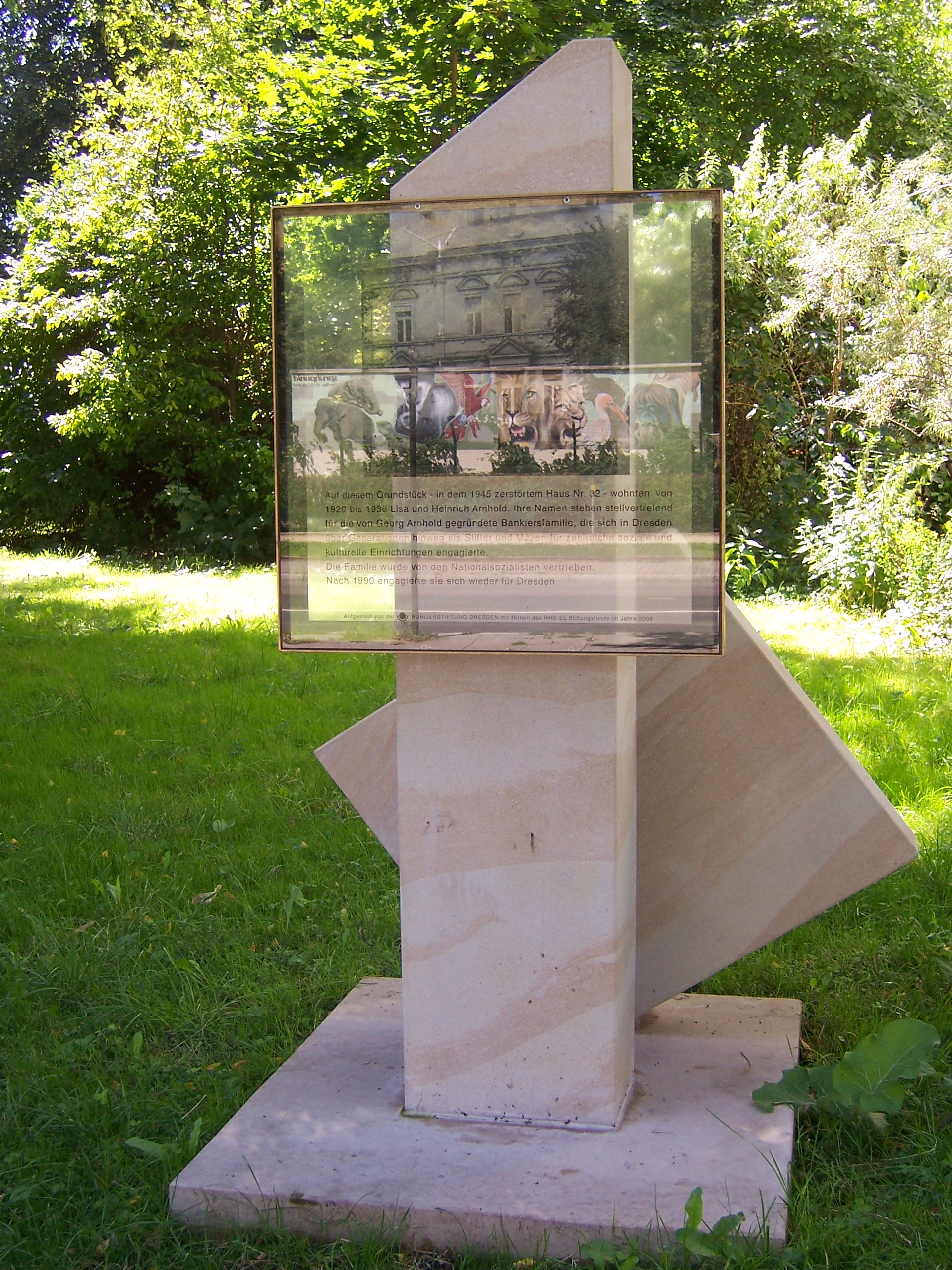 Gedenktafel am Standort des ehemaligen Hauses von Heinrich Arnhold und seiner Frau Lisa; Denkmal von Erika Lust